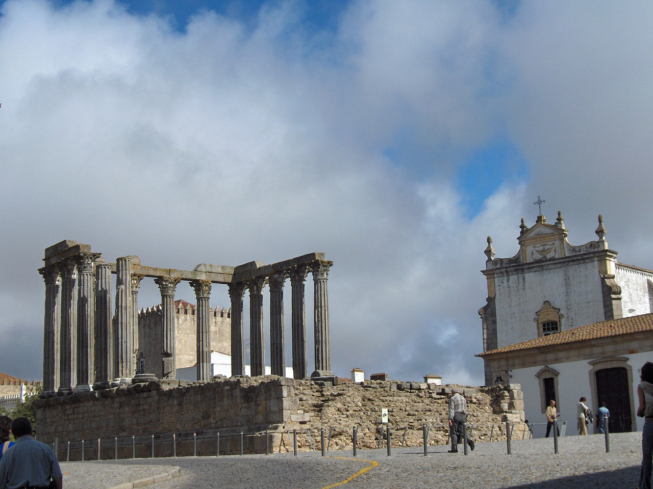 Roman temple (1st c.) and the Convento dos Lólos, Évora, Portugal